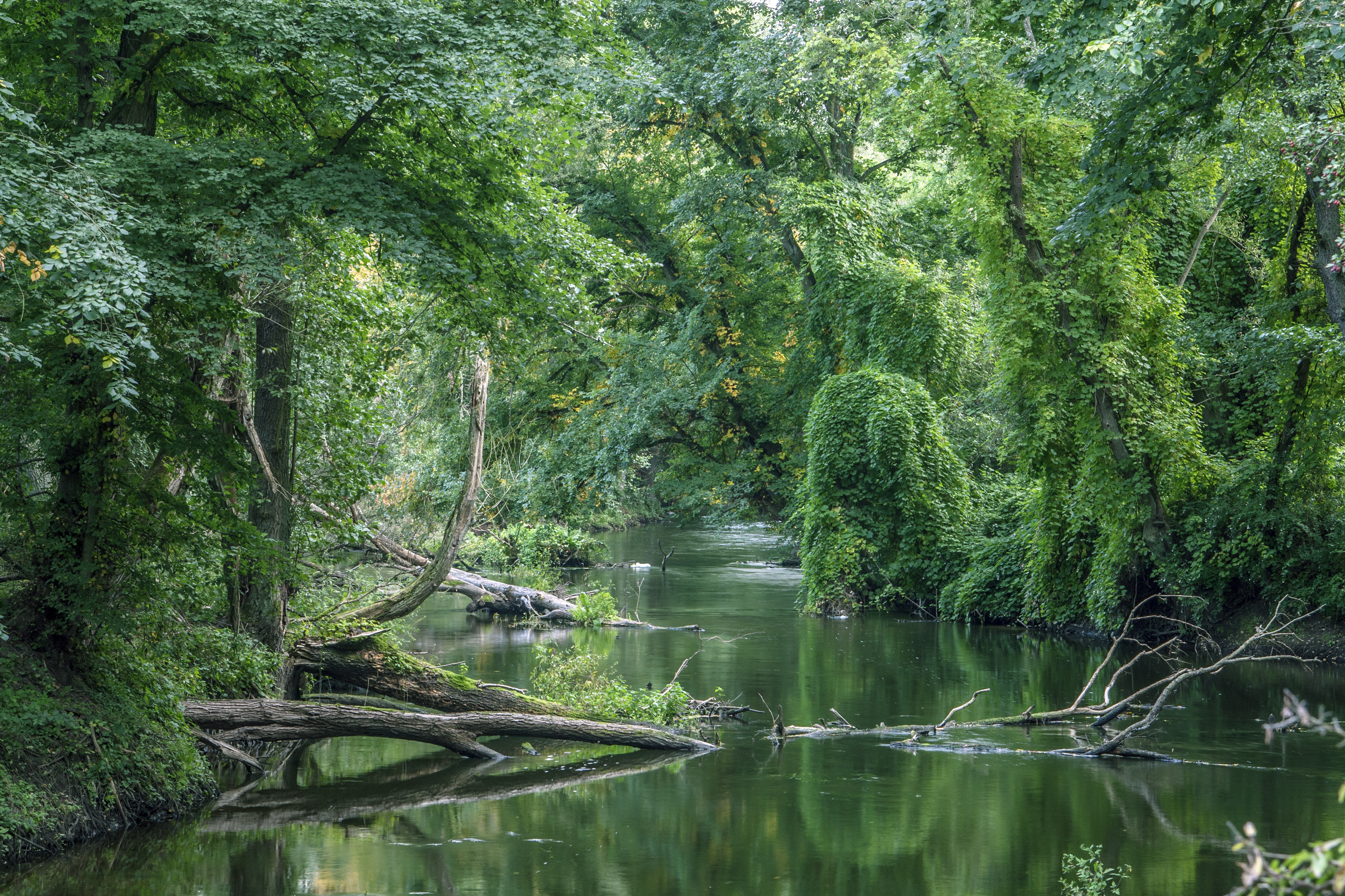 Rzeka Obra - "szlak bobrów" koło Skwierzyny